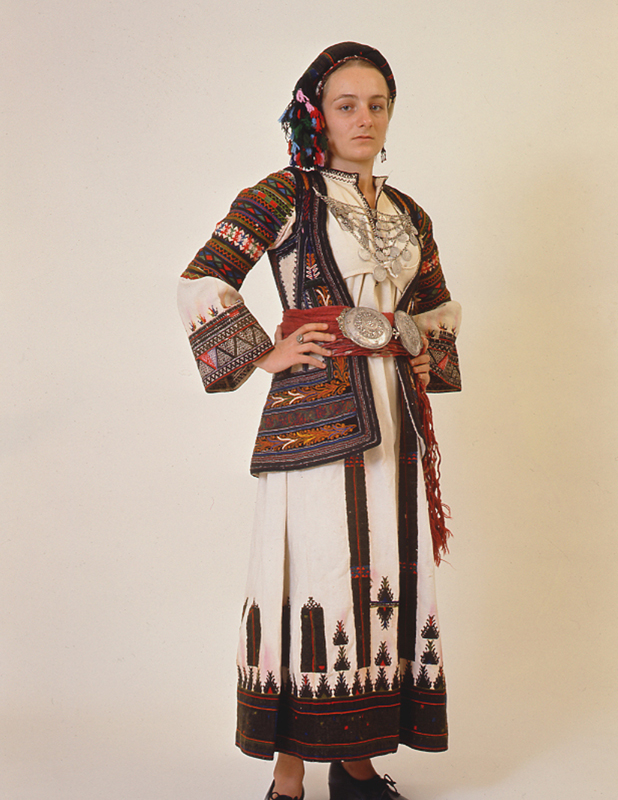 Φορεσιά της Περαχώρας Κορινθίας. Είναι πιθανόν η πλέον τυπική της Πελοποννήσου (με μικρές διαφορές) και της κεντρικής Ελλάδας. Συλλογή Πελοποννησιακού Λαογραφικού Ιδρύματος, Ναύπλιο